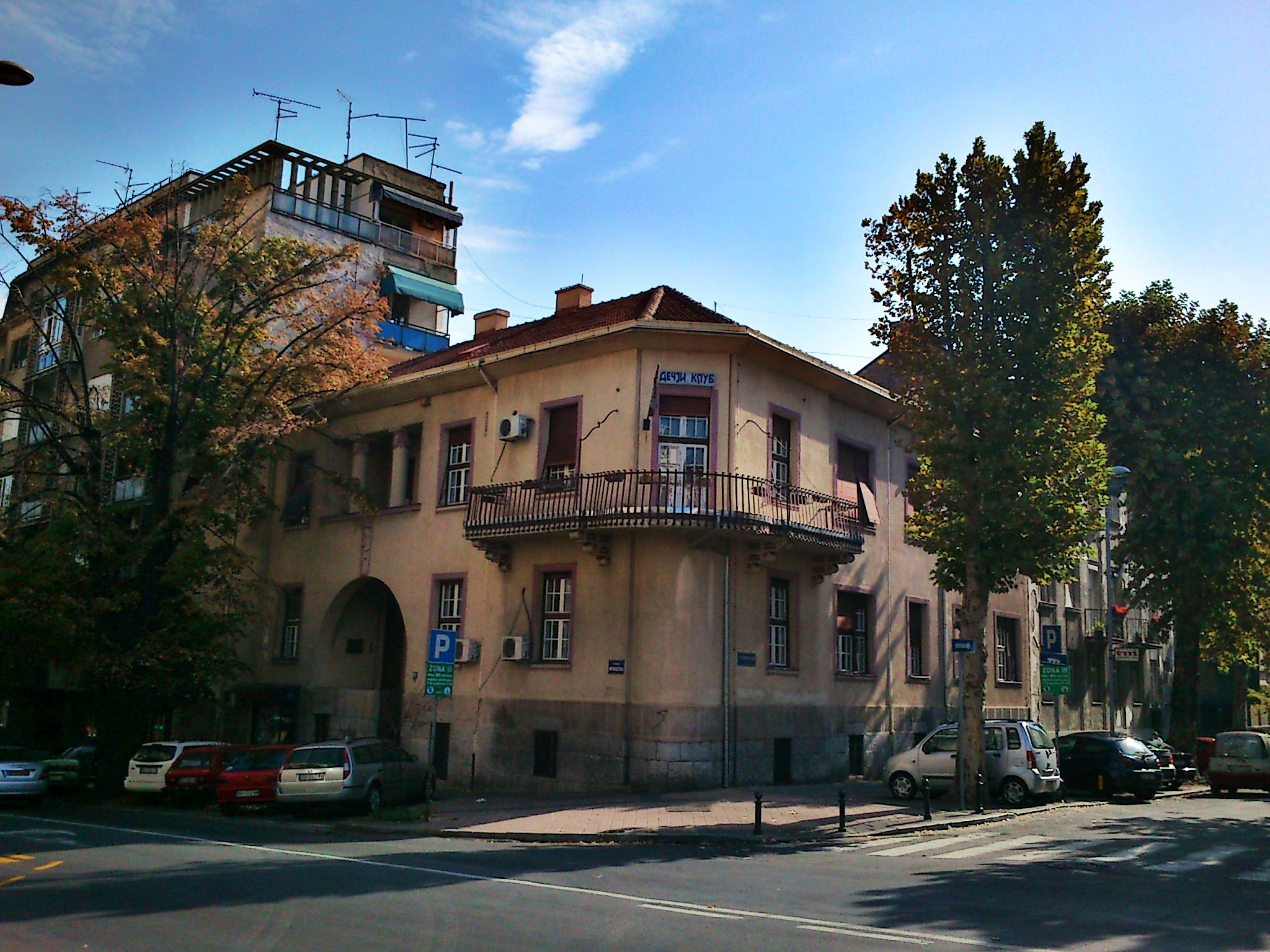 Кућа породице Рибар